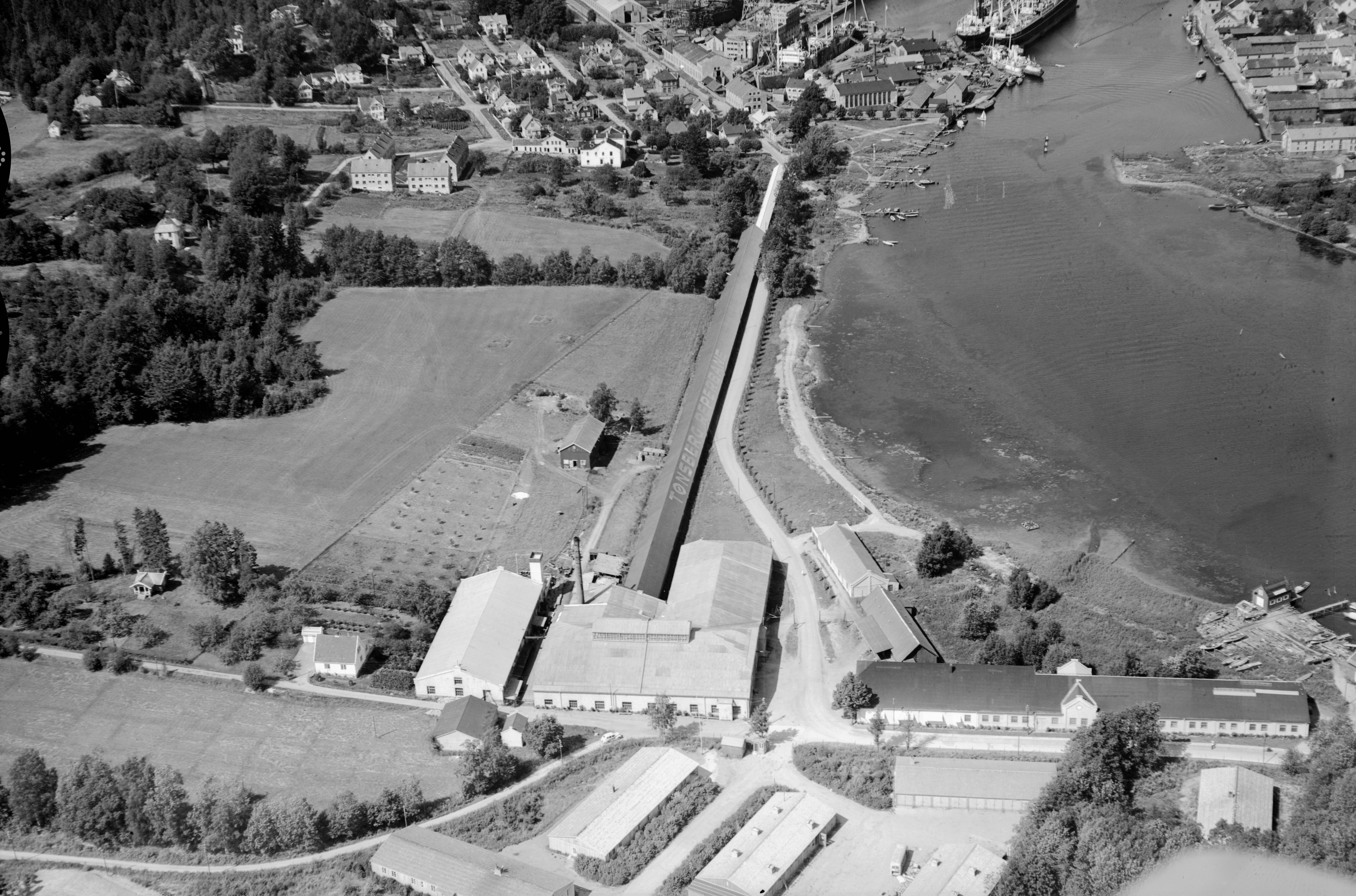 FW.S.10806